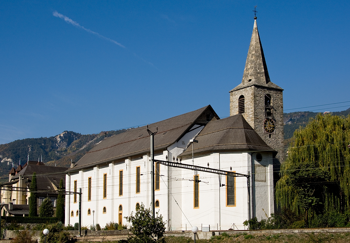 Paroisse Ste-Cathérine